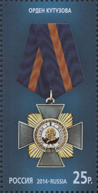 Серия "Государственные награды Российской Федерации"